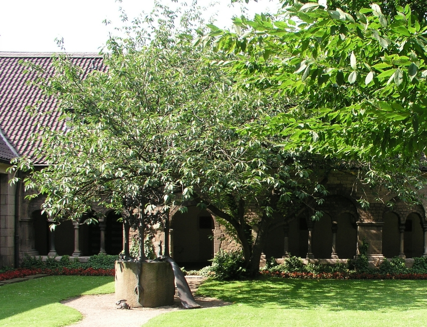 Der von Gernot Rumpf gefertigte Brunnen der Abtei Hamborn Fotografie erstellt August 2004 von Benutzer:yorg. Quellenangabe: "yorg / 2004".